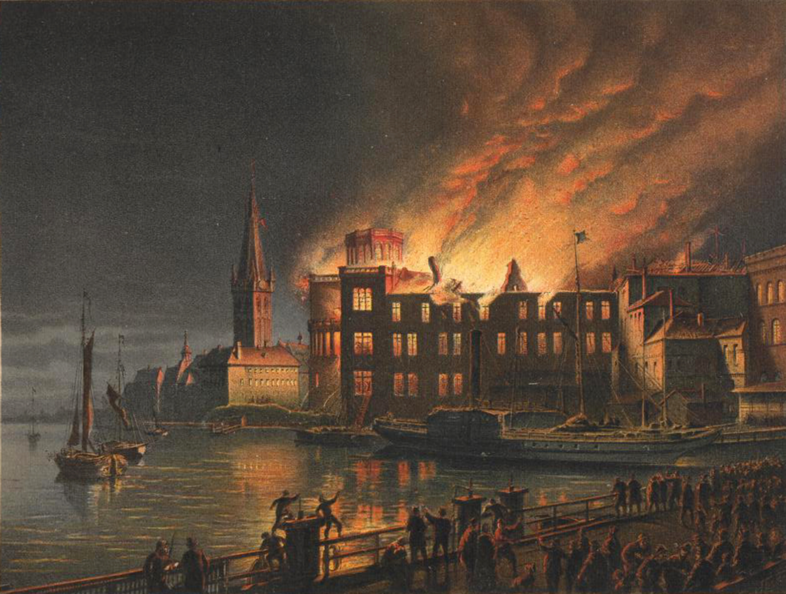 Illustration Brand der Kunst-Academie in Düsseldorf (in der Nacht vom 20. März 1872) gemalt von August von Wille, in Deutsches Künstler-Album, 1873